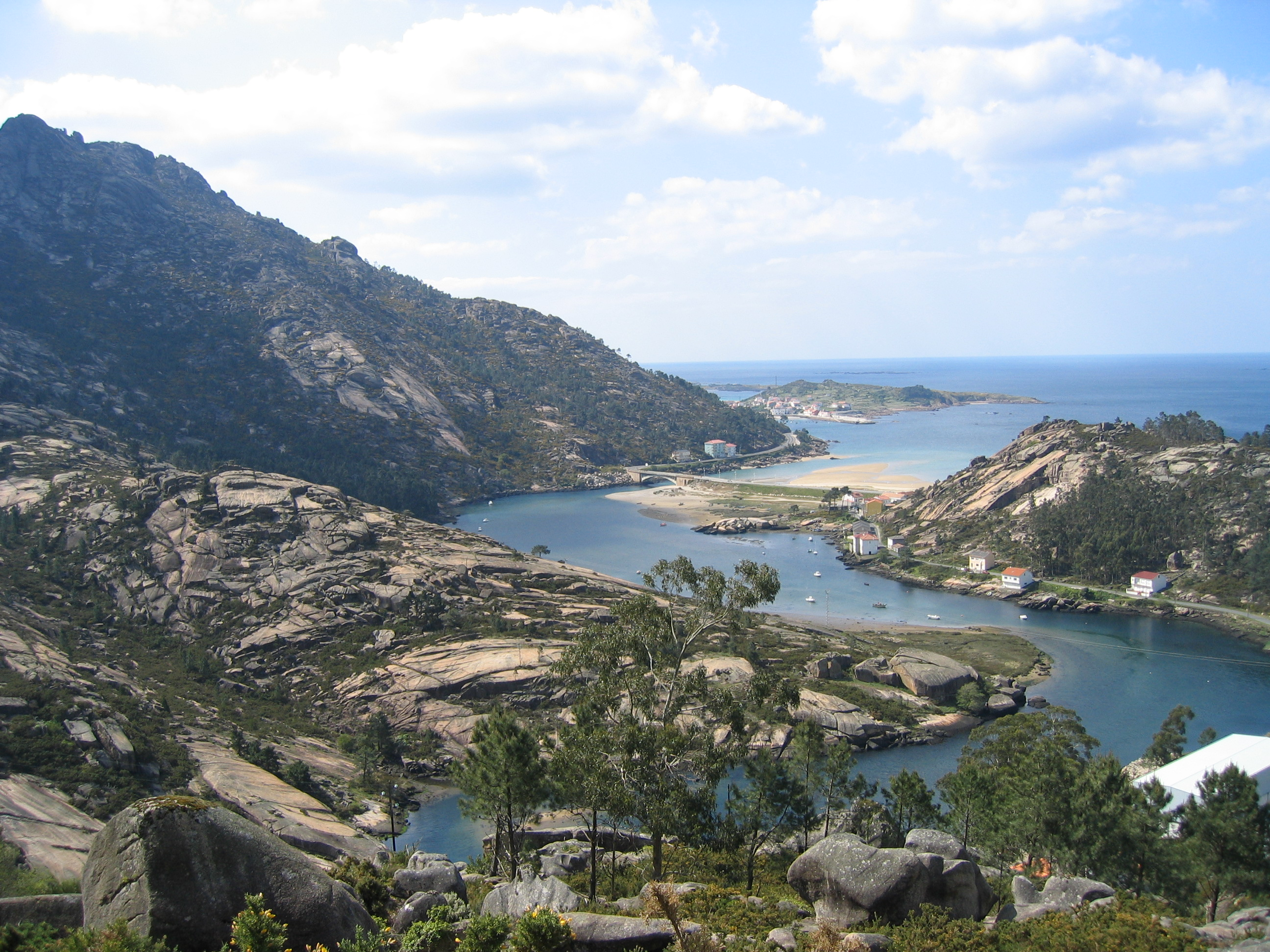 Pozas de Ézaro